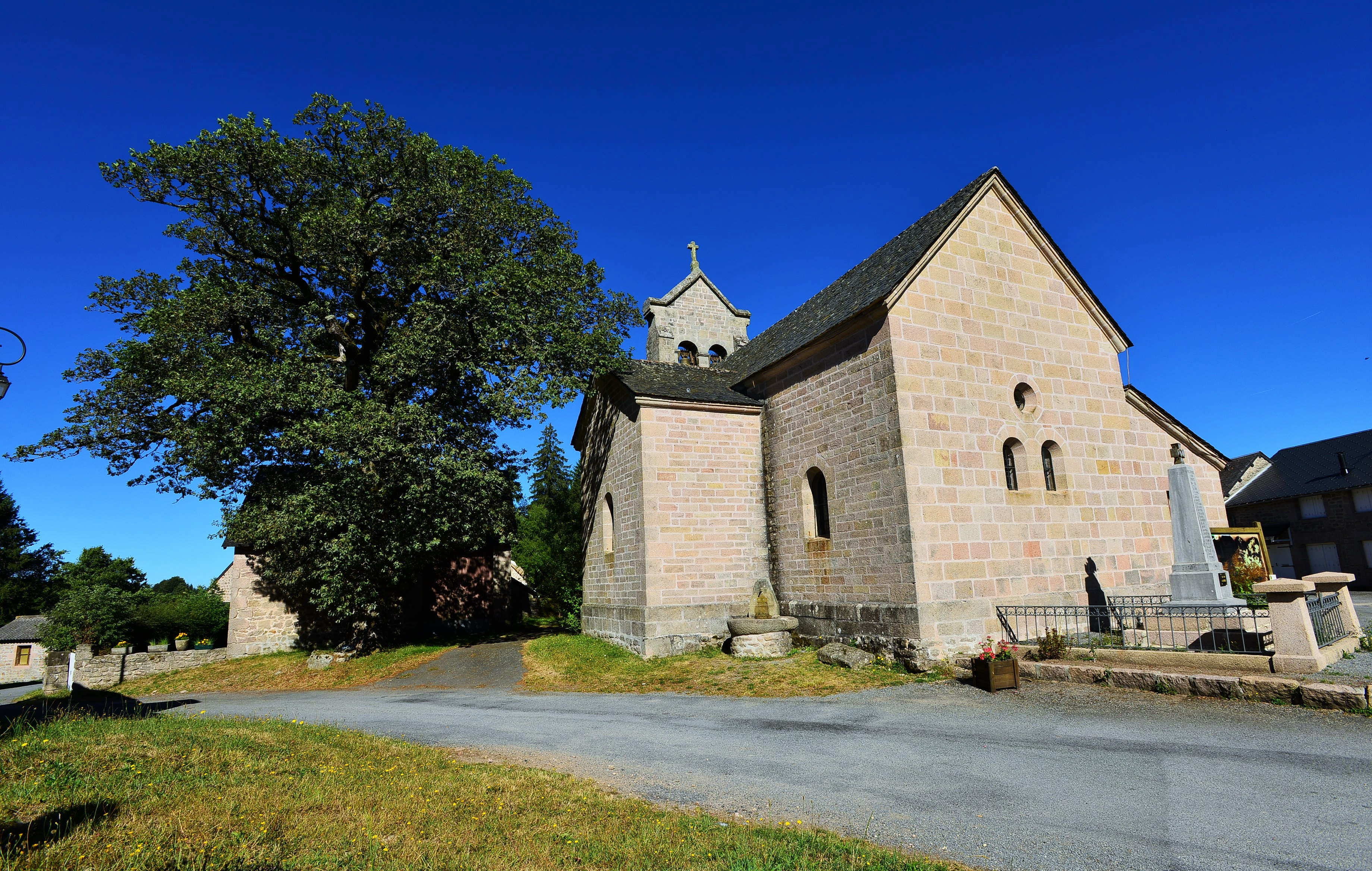 Millevaches,Corrèze, France, l'Eglise et le Monument aux Morts